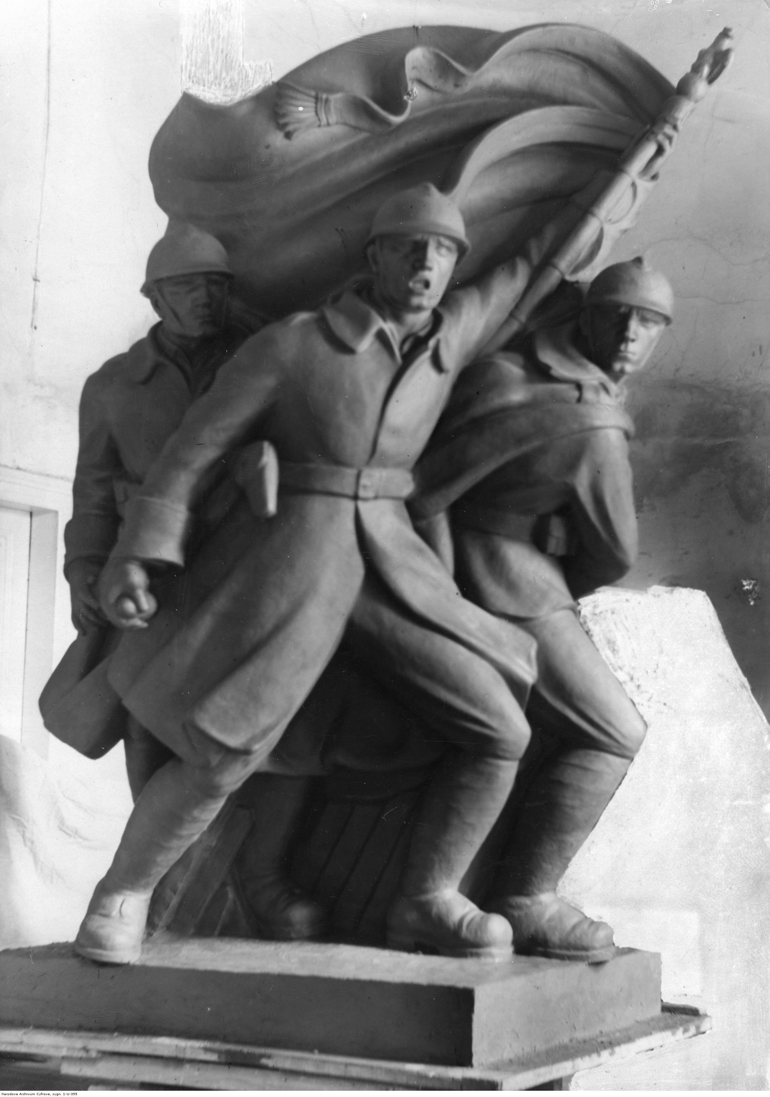 Brzeżany; woj. tarnopolskie. Pomnik ku czci poległych żołnierzy 51 pułku piechoty - fragment. Koncern Ilustrowany Kurier Codzienny - Archiwum Ilustracji. Sygnatura: 1-U-355